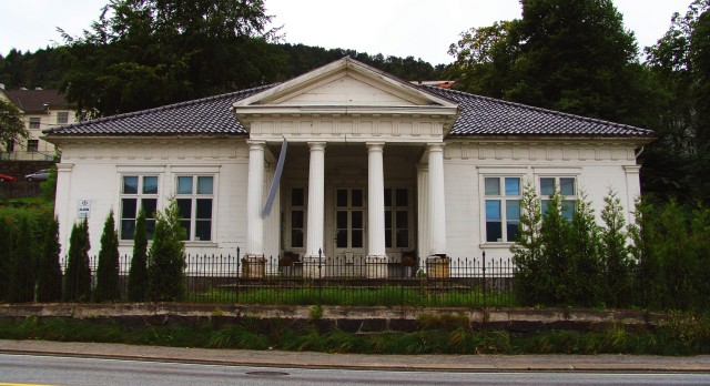 Urdi i Bergen, sett rett forfra fra Michael Krohns gate.